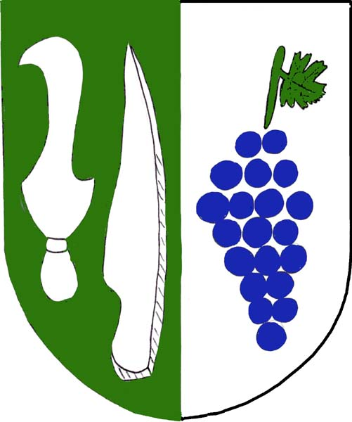 Znak obce Viničné Šumice